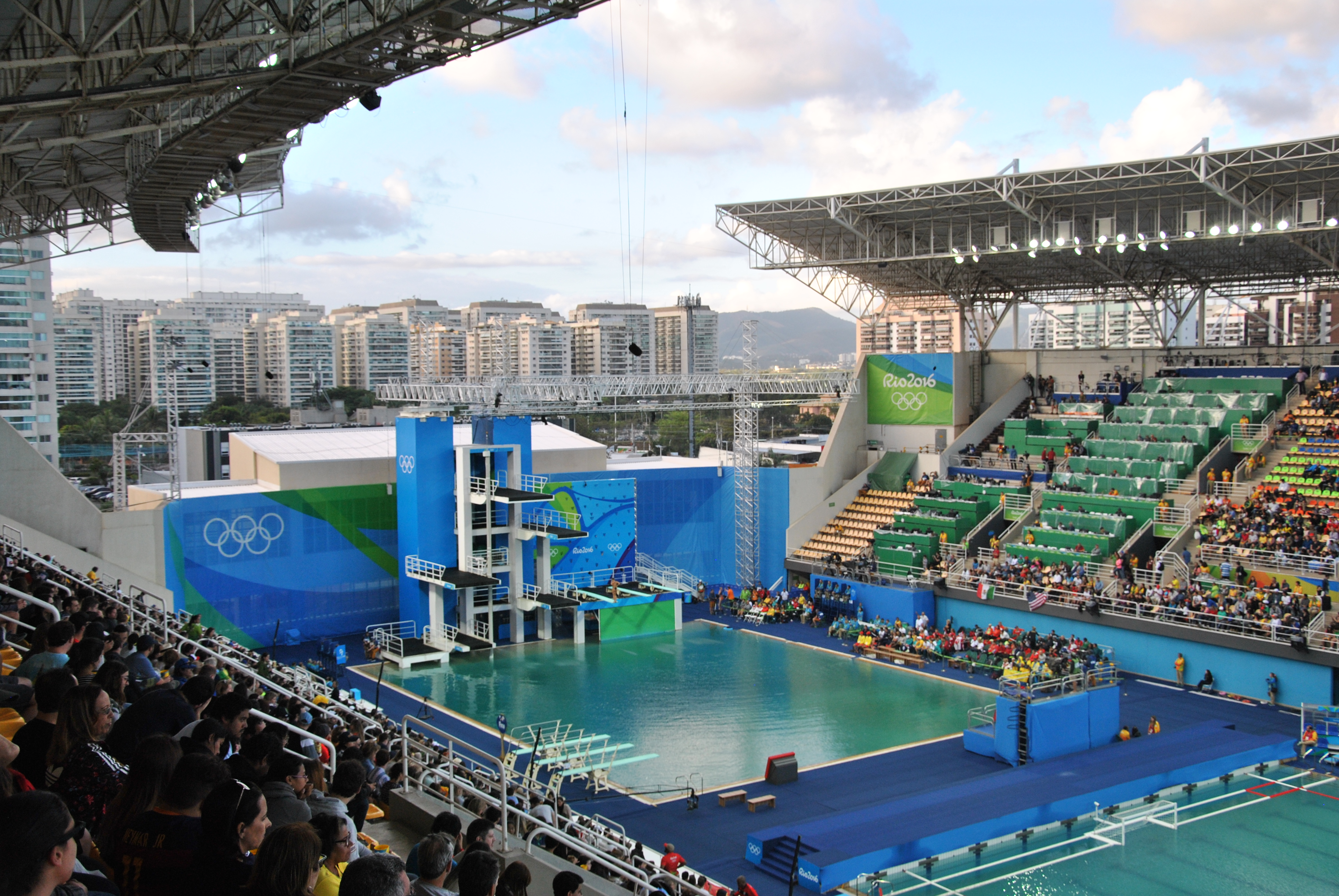 Saltos Ornamentais (Diving) - Rio 2016